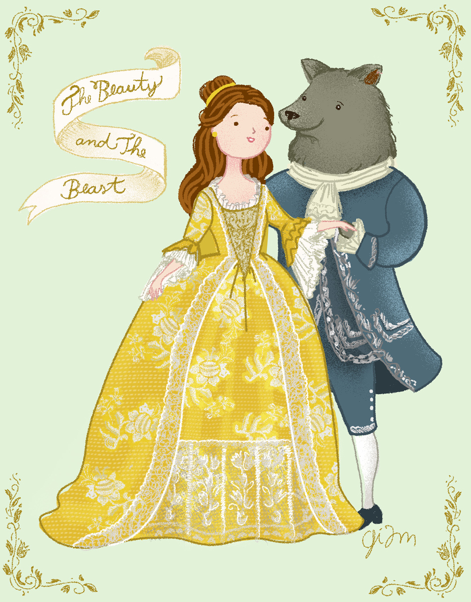 Eu vi essas roupas no OMGTHATDRESS , e fiquei com vontade de desenhar na hora. Esse vestido amarelo me lembrou da Bella da disney, e na minha cabeça (junto com a Wikipedia) as datas do vestido e do conto são próximas. (As roupas são de 1760). Aparentemente essa cor de vestido era comum na época. O link do omg redirecionou para esse site aqui aqui da Bella e [#//host2.piction.com/icons/dmx/wsdemo/mainimage.html?surl=1410564891ZZJUAKTXFKFS75992&umoid=454243 e aqui da Fera] A Bela e a Fera, acho que esse é um dos meus desenhos animados preferidos :)